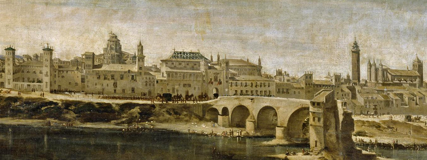 Detalle de la Vista de Zaragoza (1647). Óleo sobre lienzo, 181 × 331 cm. Madrid, Museo del Prado.